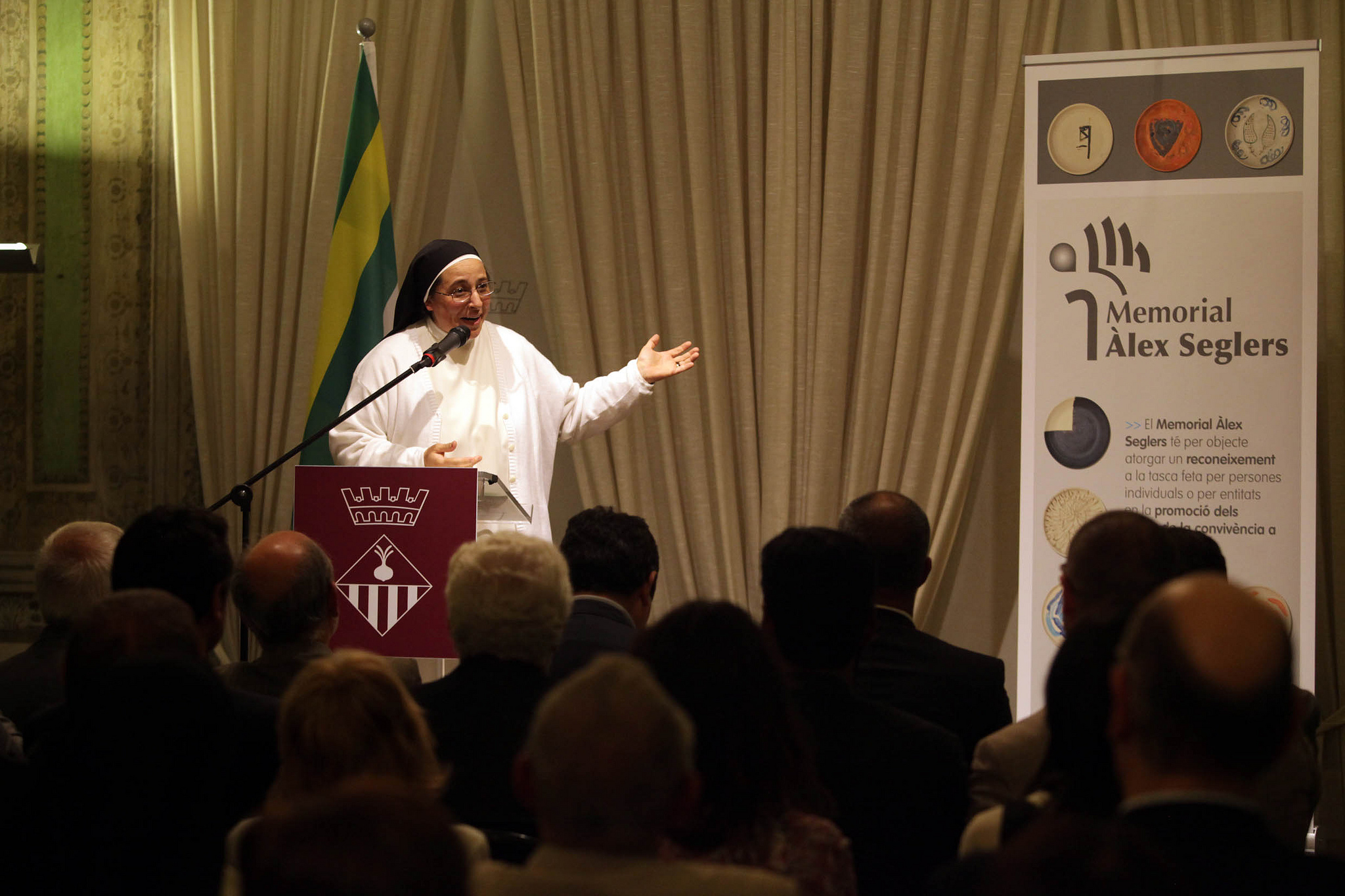 Sor Lucia Caram en el seu discurs d'agraiment en rebre el guardo en favor del dialeg interreligios en l'ambit del Paisos Catalans i la seva responsabilitat en l'organitzacio del II Parlament Catala de les Religions l'any 2006